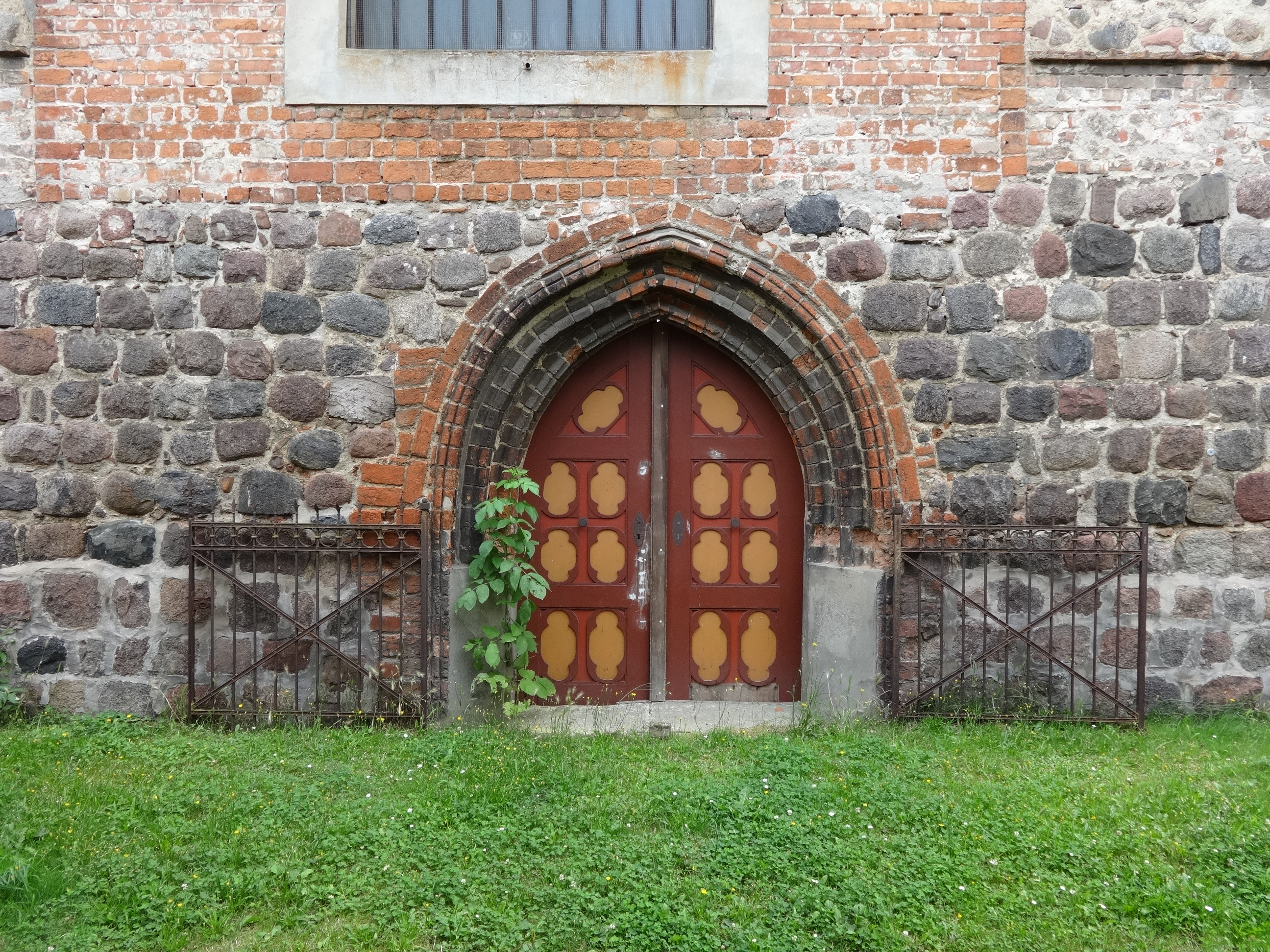 Nikolaikirche aus dem 12. Jahrhundert in Pasewalk. Sie gilt als die größte Feldsteinkirche Mecklenburg-Vorpommerns. Mehrfach zerstört und aufgebaut erhielt sie 1615 einen Renaissanceturm, der 1945 zerstört und abgetragen wurde.